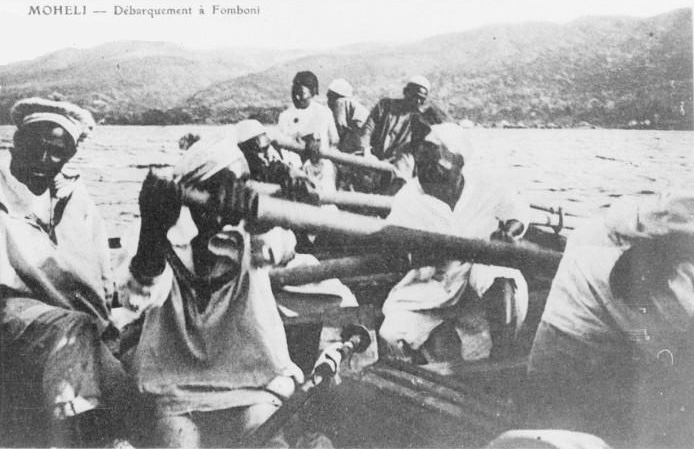 Moheli: débarquement à Fomboni